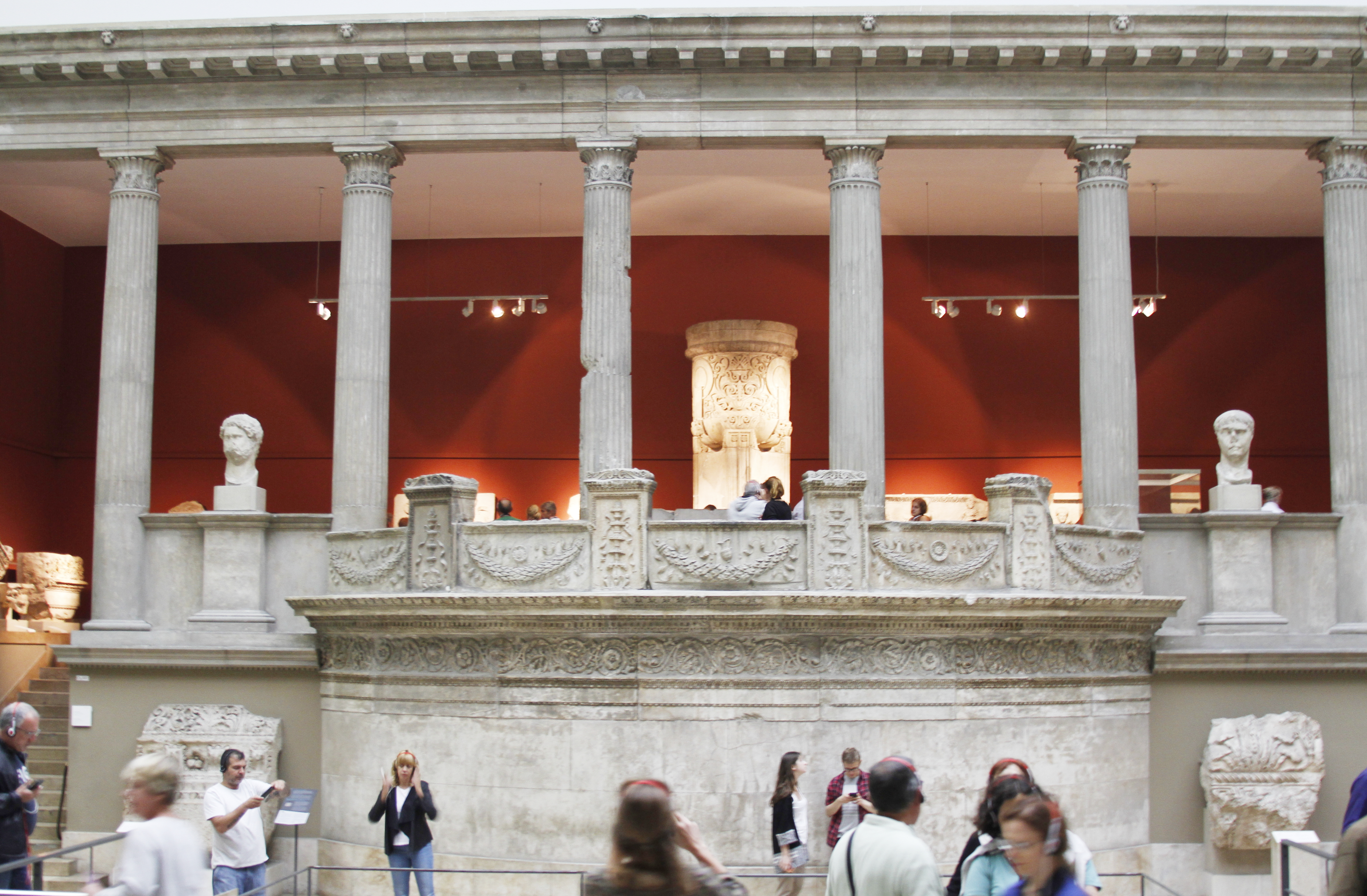 Antiquities from Miletus - Pergamonmuseum - Berlin - Germany